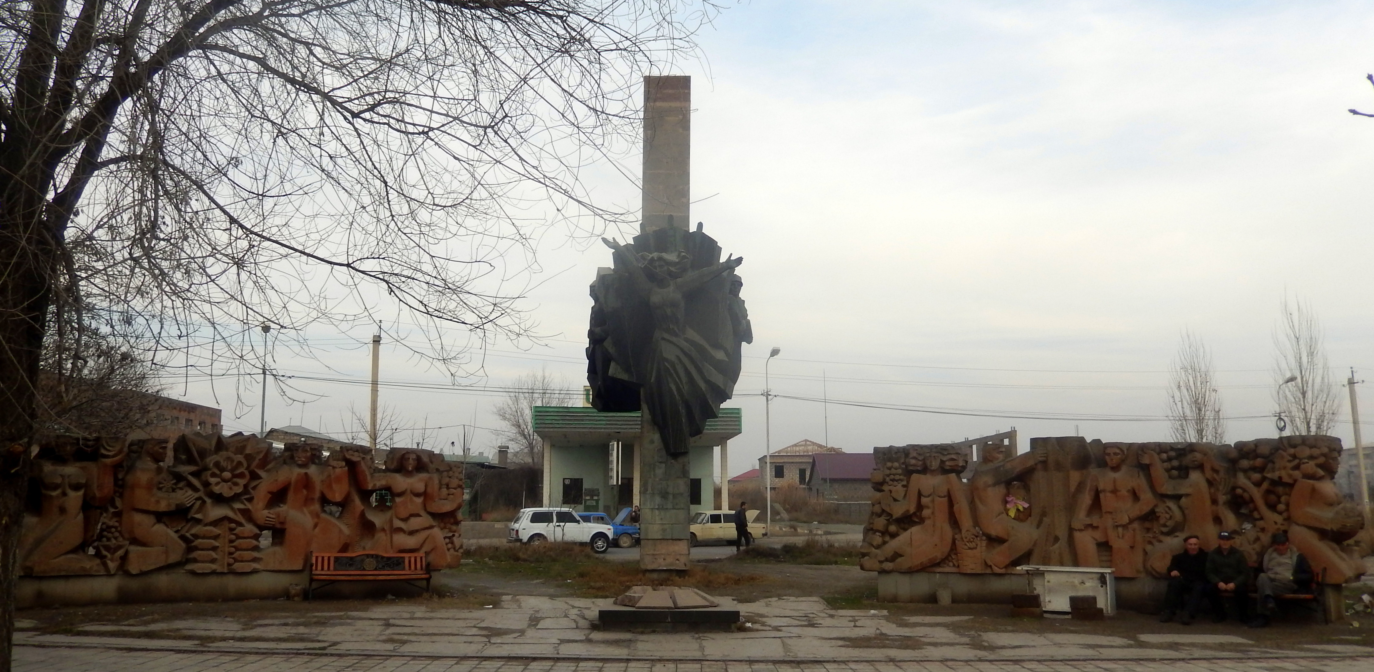 Monument devoted to the victims of WW II in the city of Masis, Ararat Region, 1983 57/3